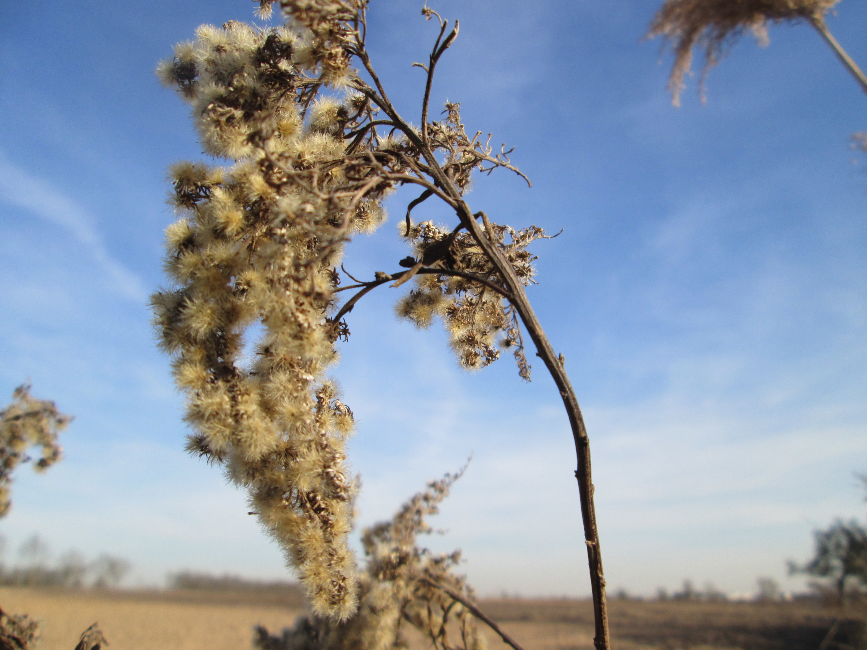 Riesen-Goldrute (Solidago gigantea) bei Reilingen